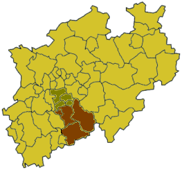 Niederbergisches und oberbergisches Land andere Versionen: keine